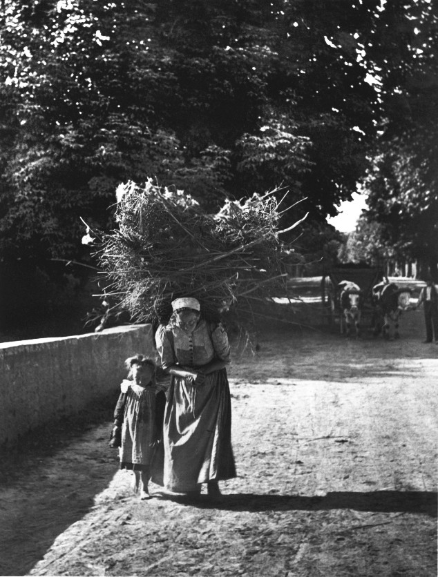 Louis Held: Reisigträgerin